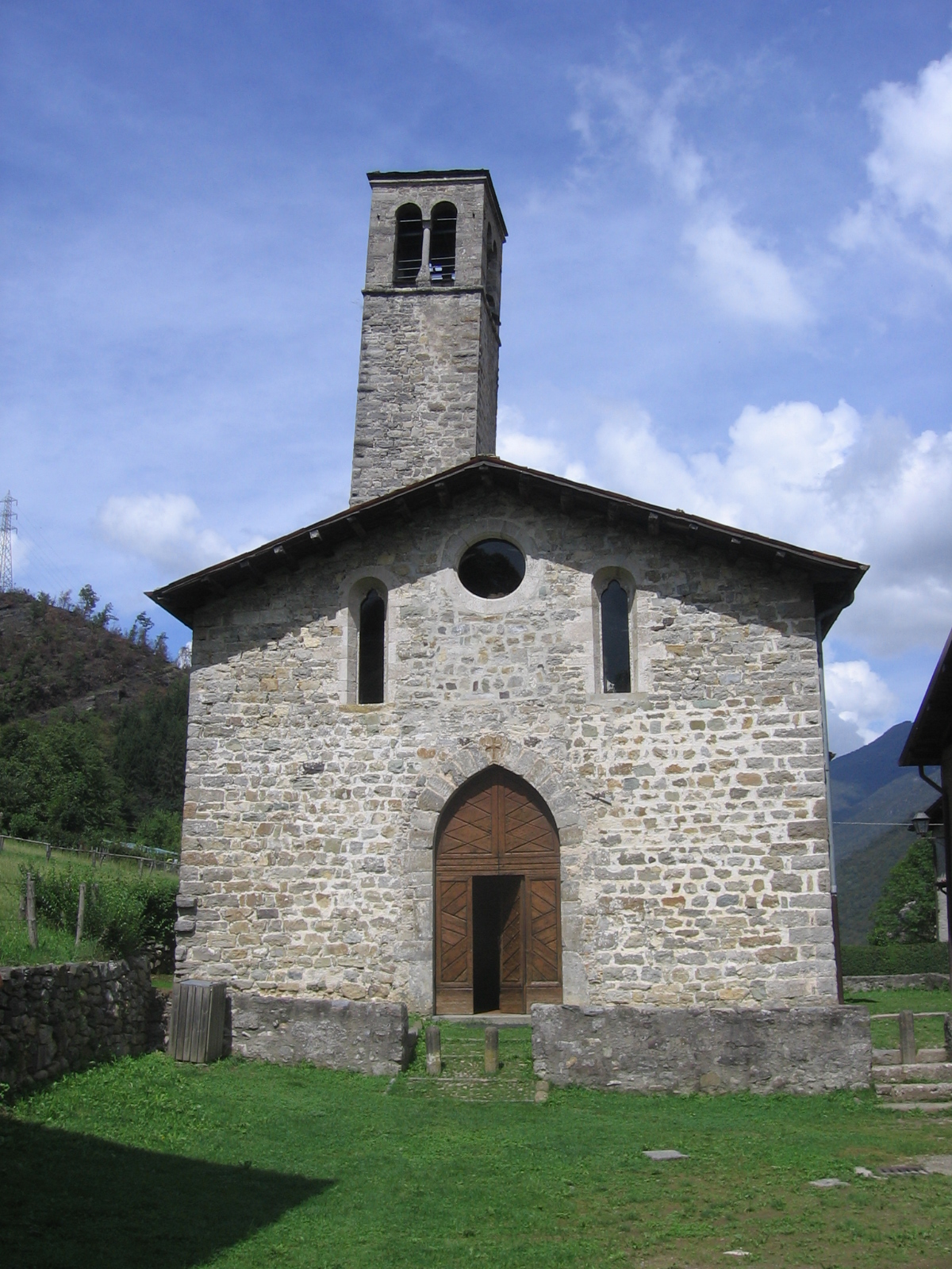 Chiesa dei Santi Cipriano e Cornelio di Camerata Cornello in Camerata Cornello, Bergamo, Italy